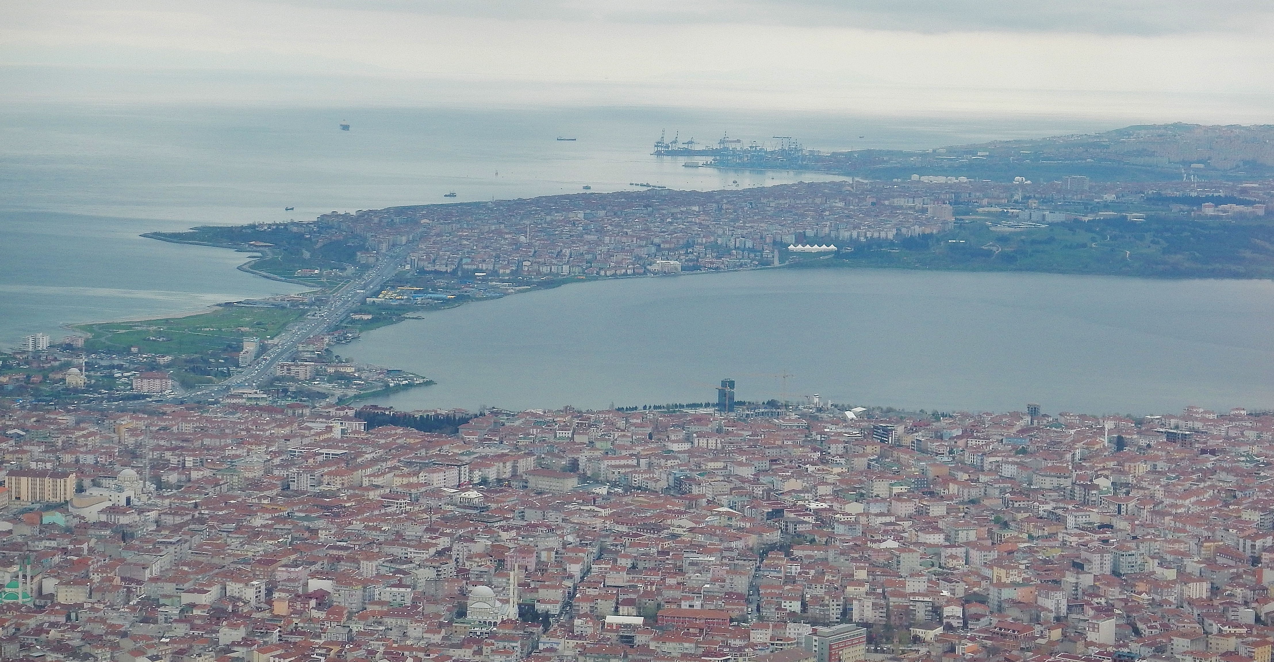 Küçükçekmece